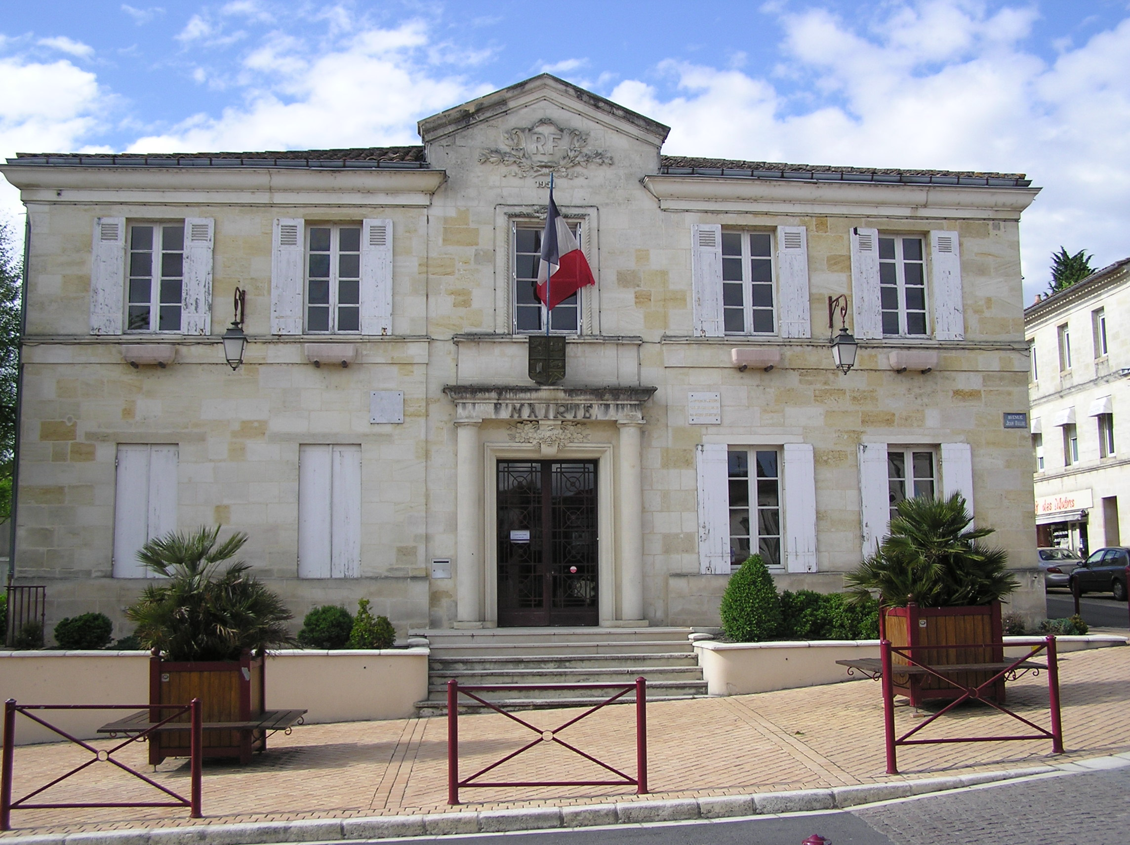 Mairie de Latresne en Gironde mai 2008